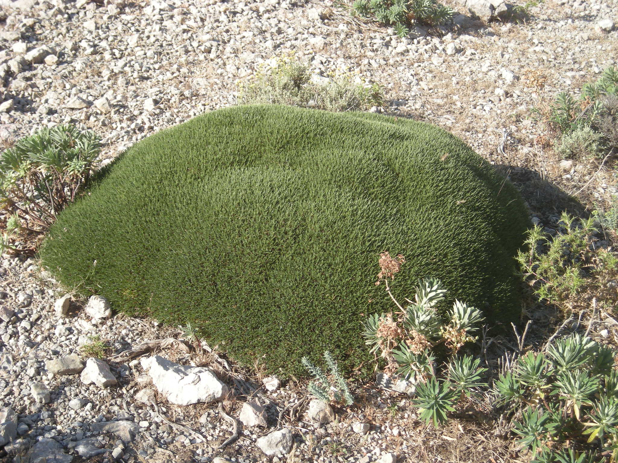 Coixinet de monja (Astragalus balearicus). Puig Major, Mallorca.